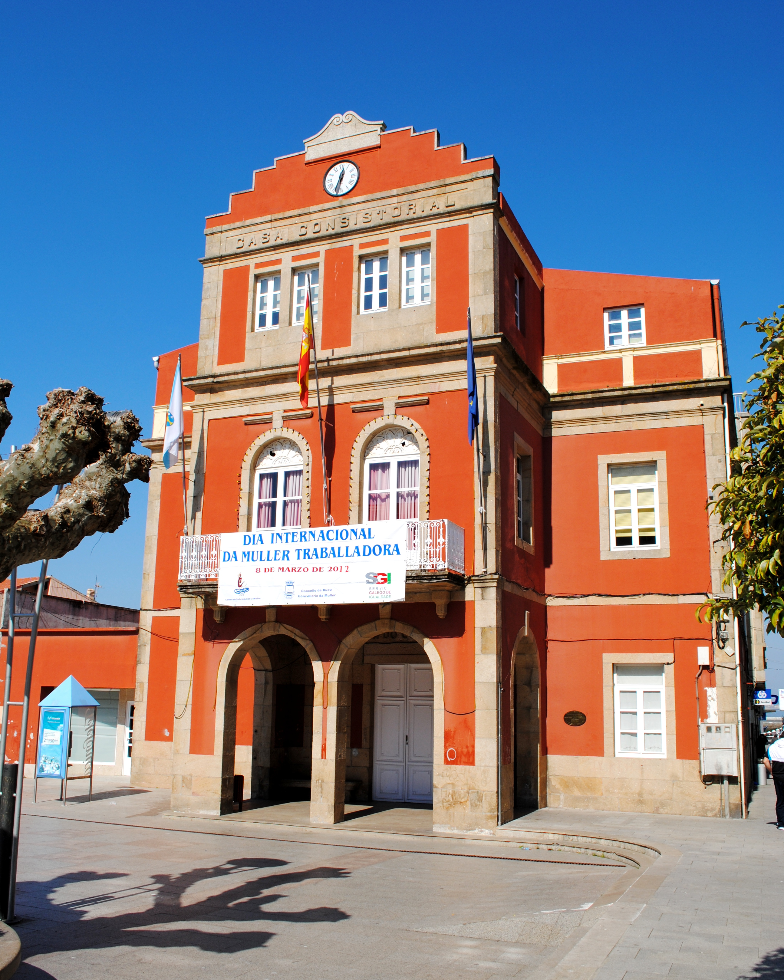 Casa do Concello de Bueu